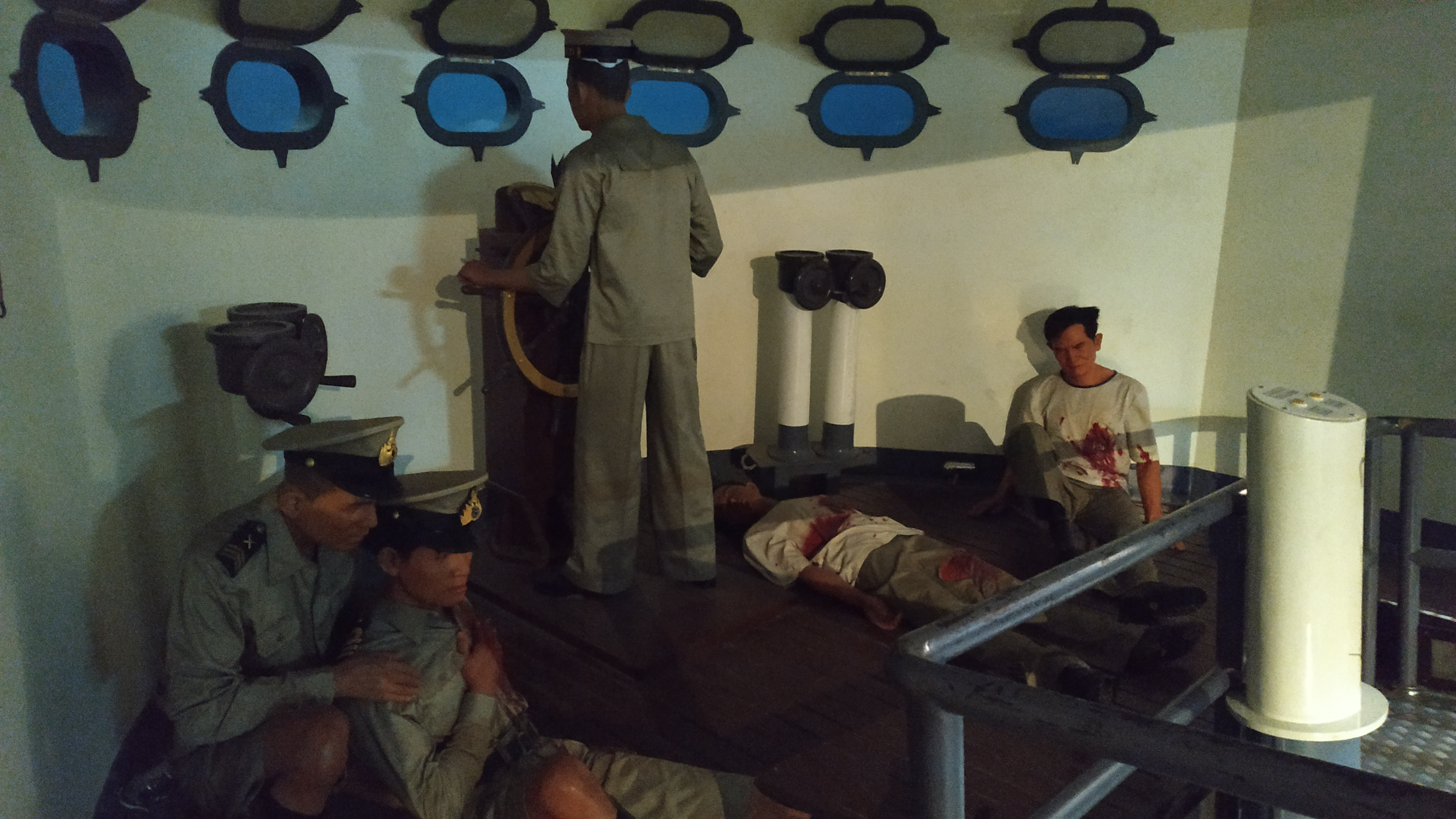 ฉากจำลองเหตุการณ์การปฏิบัติหน้าที่ของทหารเรือไทยในการรบที่เกาะช้าง เมื่อวันที่ 17 มกราคม พ.ศ. 2484 จัดแสดงที่อาคารอนุสรณ์สถานแห่งชาติ ตำบลคูคต อำเภอลำลูกกา จังหวัดปทุมธานี ฉากจำลองเหตุการณ์ดังกล่าว แสดงภาพความยากลำบากในการควบคุมเรือหลวงธนบุรี เนื่องจากระหว่างปฏิบัติการรบนั้น ได้มีระเบิดจากเครื่องบินรบทิ้งลงมาใส่หอบังคับการเรือ ระเบิดลูกนั้นได้ทำให้นาวาเอก หลวงพร้อมวีระพันธ์ (พร้อม วีระพันธ์) ผู้บังคับการเรือหลวงธนบุรี เสียชีวิตทันที มีนายทหารเสียชีวิตและบาดเจ็บสาหัสหลายนาย ส่งผลให้การบังคับบัญชา สื่อสาร และควบคุมหยุดชะงัก ระบบถือท้ายเสียหายบังคับทิศทางไม่ได้ ทำให้เรือแล่นหมุนวนไปมา นอกจากนี้ยังทำให้ระบบป้อมปืนไม่ทำงาน ทหารฝ่ายไทยต้องใช้วิธีการหมุนป้อมปืนด้วยมือเอง การยิงโต้ตอบของเรือหลวงธนบุรีจึงเป็นไปอย่างยากลำบากยิ่ง